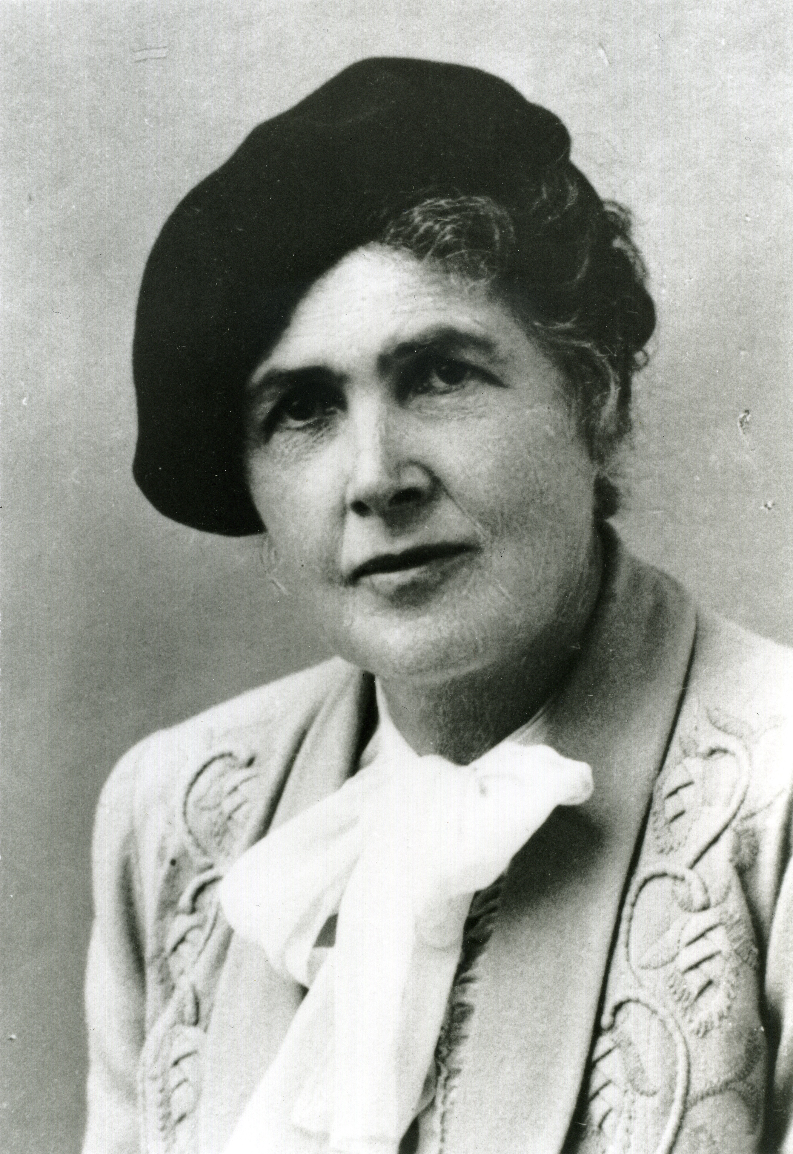 Portrait